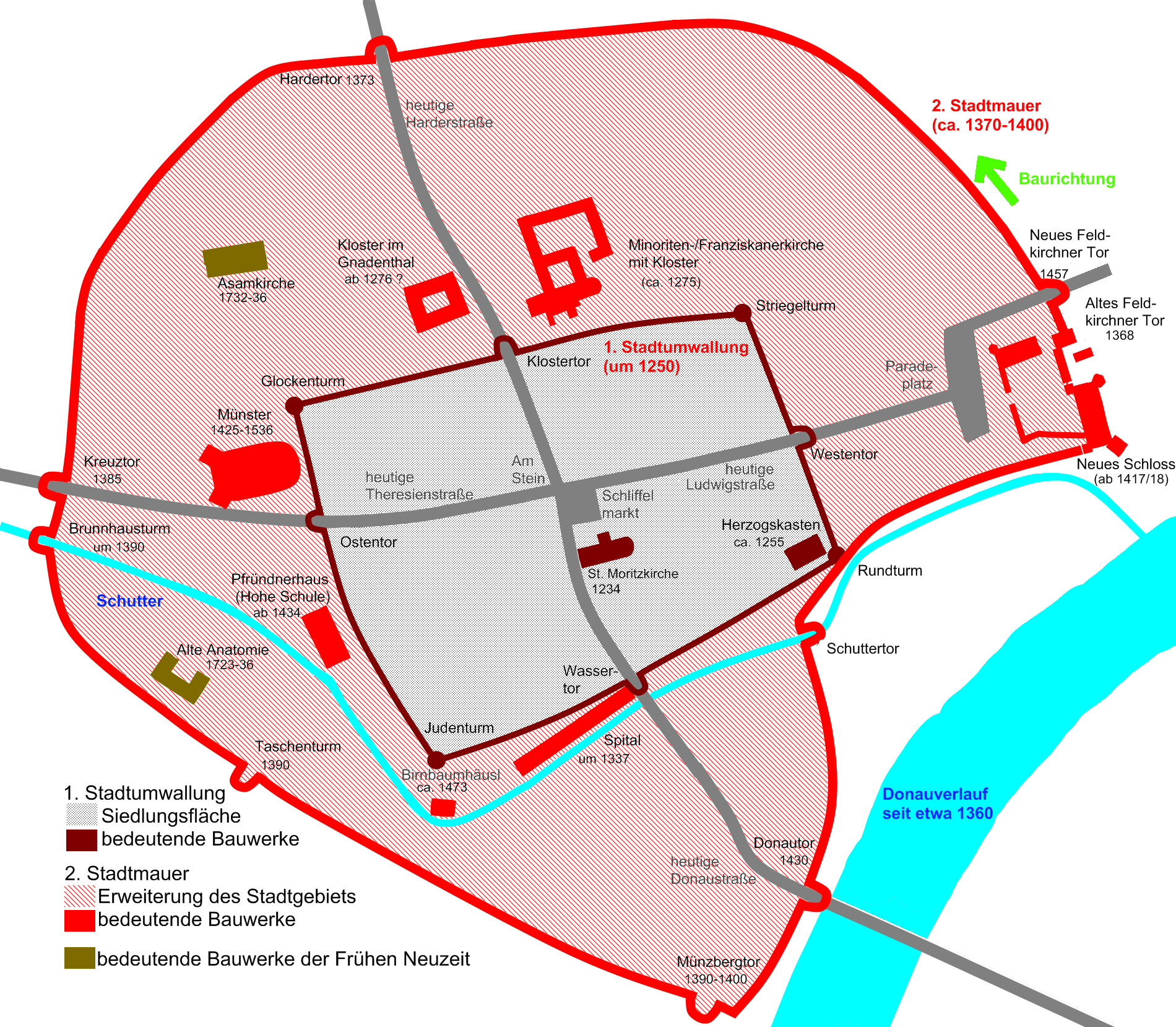 Entwicklung Ingolstads im Mittelalter